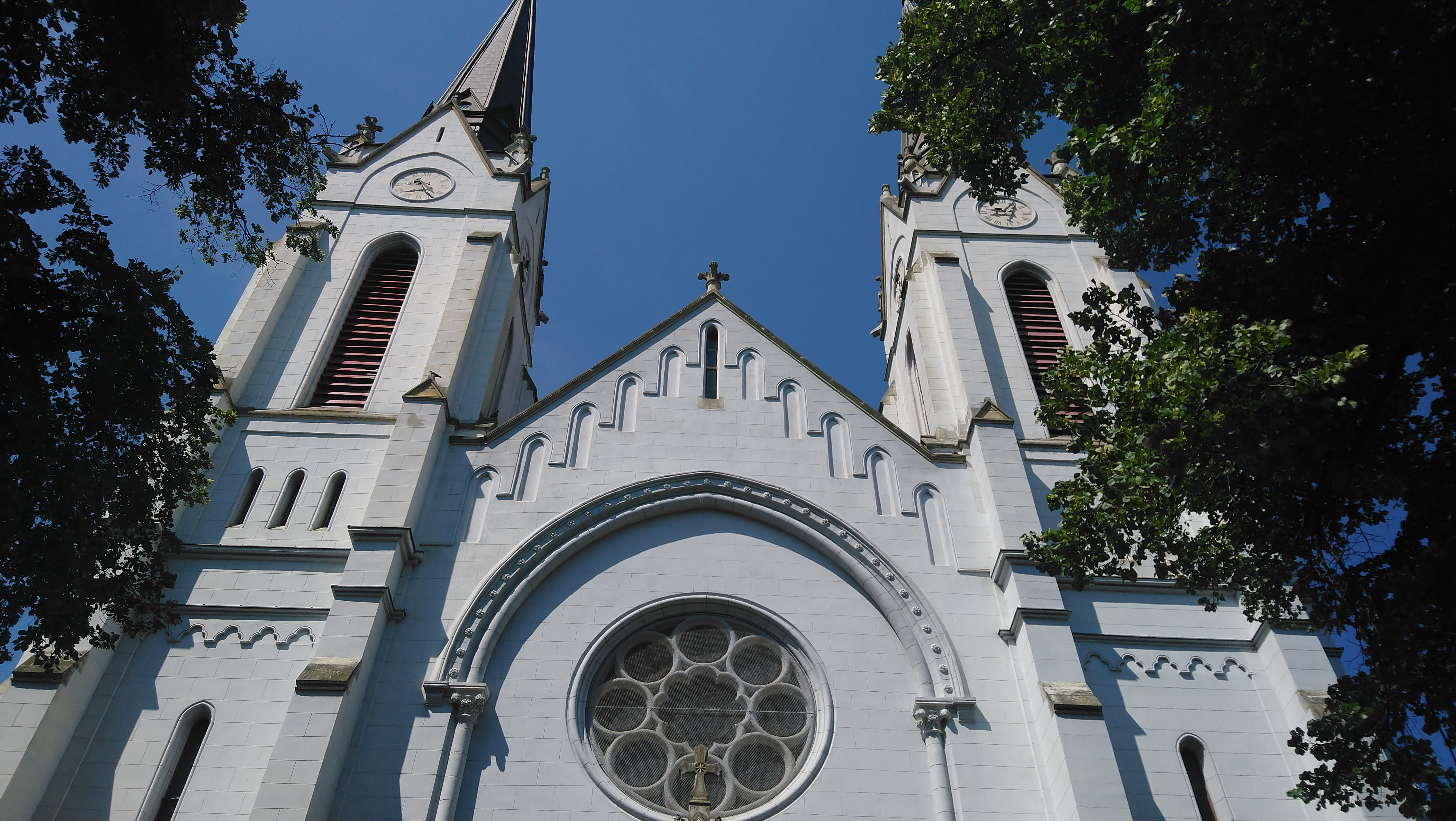 Crkva srca Isusovog u Futugu - pogled sa prednje strane